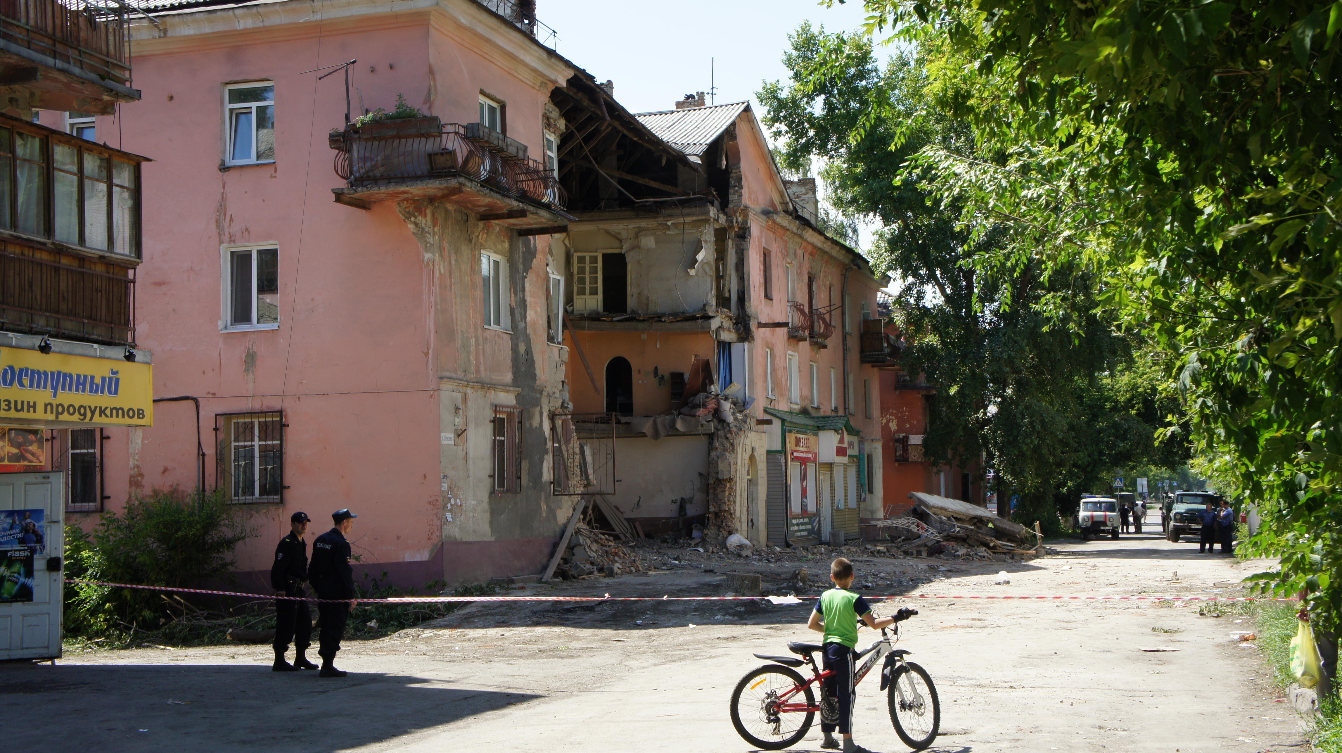 Последствия обрушения дома на ул. Э. Алексеевой 33, 17 июля 2013 г, г. Барнаул, в результате которого погибло 2 человека